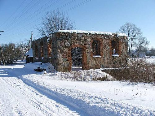 Руіны сінагогі ў в. Лужкі